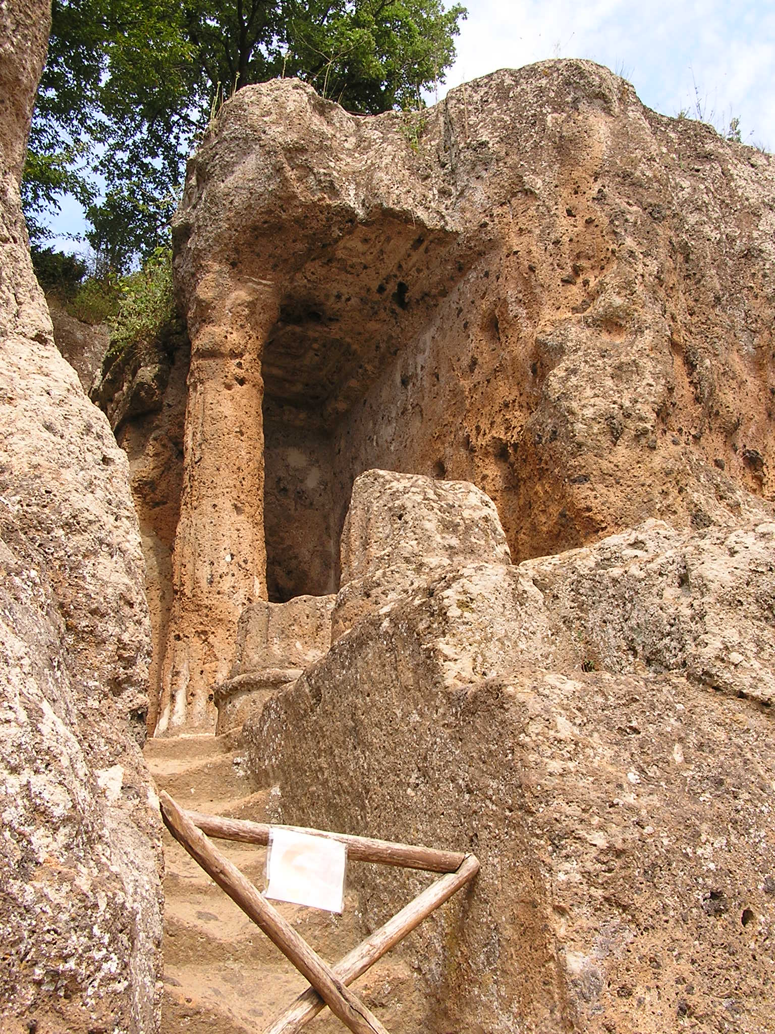 Tomba Ildebranda Ort & Datum: Ende August 2006